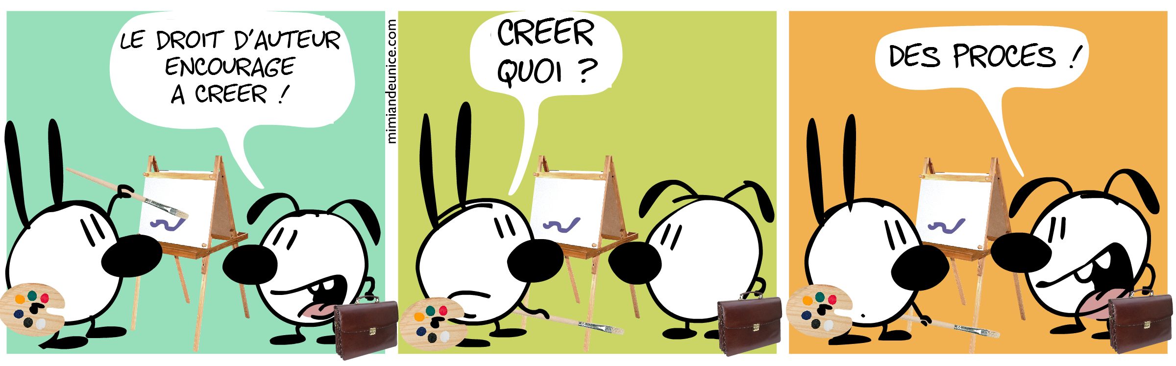 Le droit d'auteur encourage à créer ! Créer quoi ? Des procès !